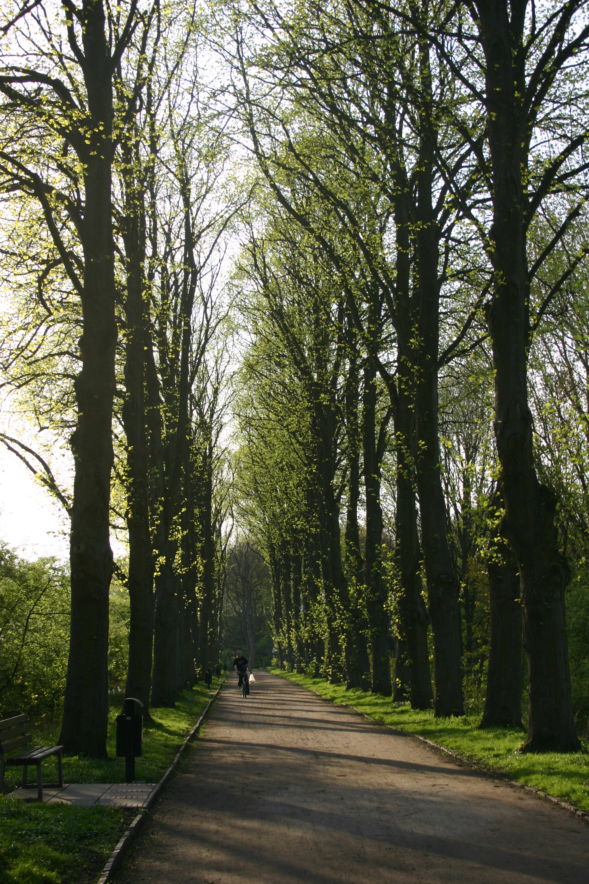 Emder Wall (mittelalterliche Befestigungsanlage, heute Park)